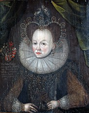 Anna III. von Stolberg-Weringerode (1565-1601), Äbtissin von Quedlinburg